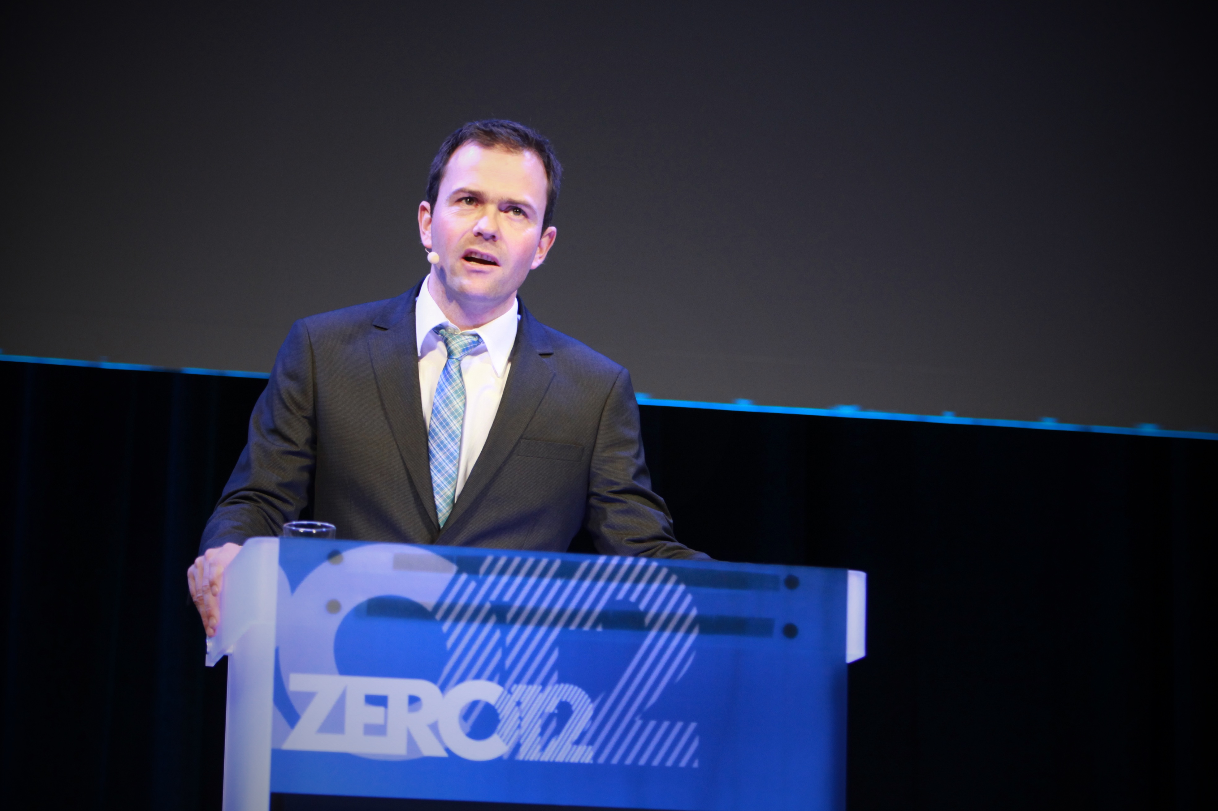 Marius Holm ZERO-konferansen arrangeres av den norske miljøstiftelsen Zero Emission Resource Organization (ZERO). Foto: Eirik Helland Urke